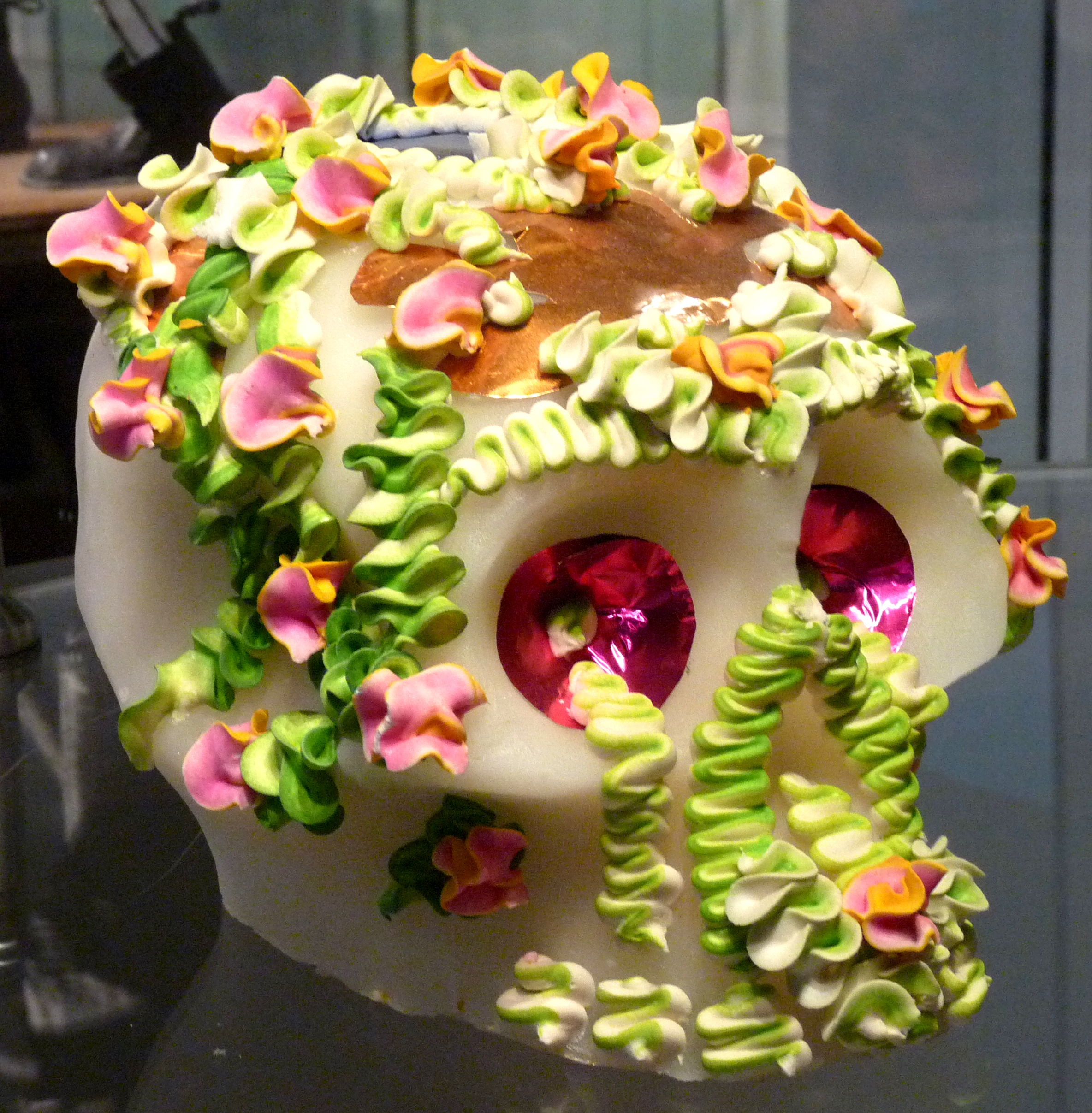 Calavera en sucre (Musée d'Art Populaire de Mexico).